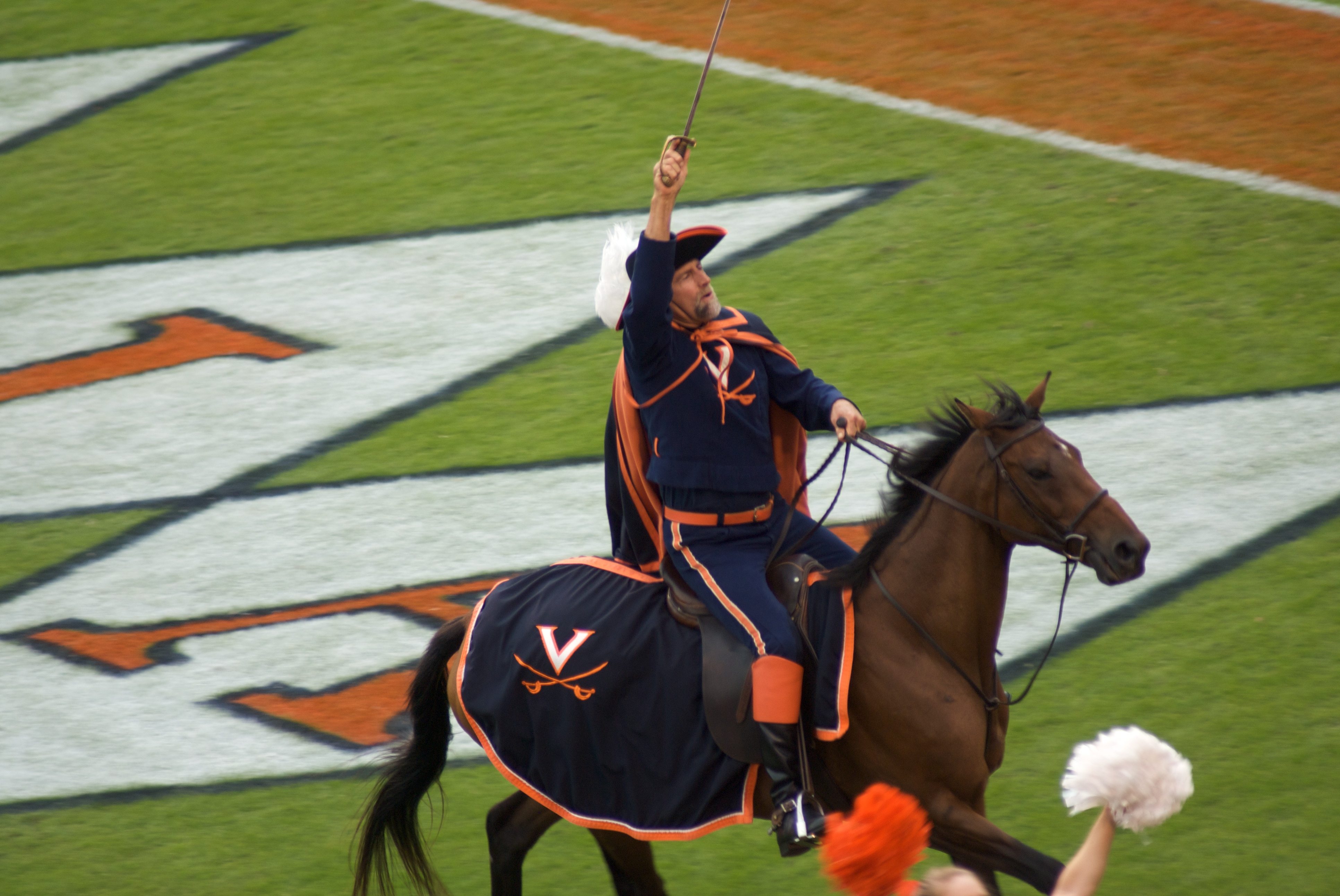 UVA Cav man